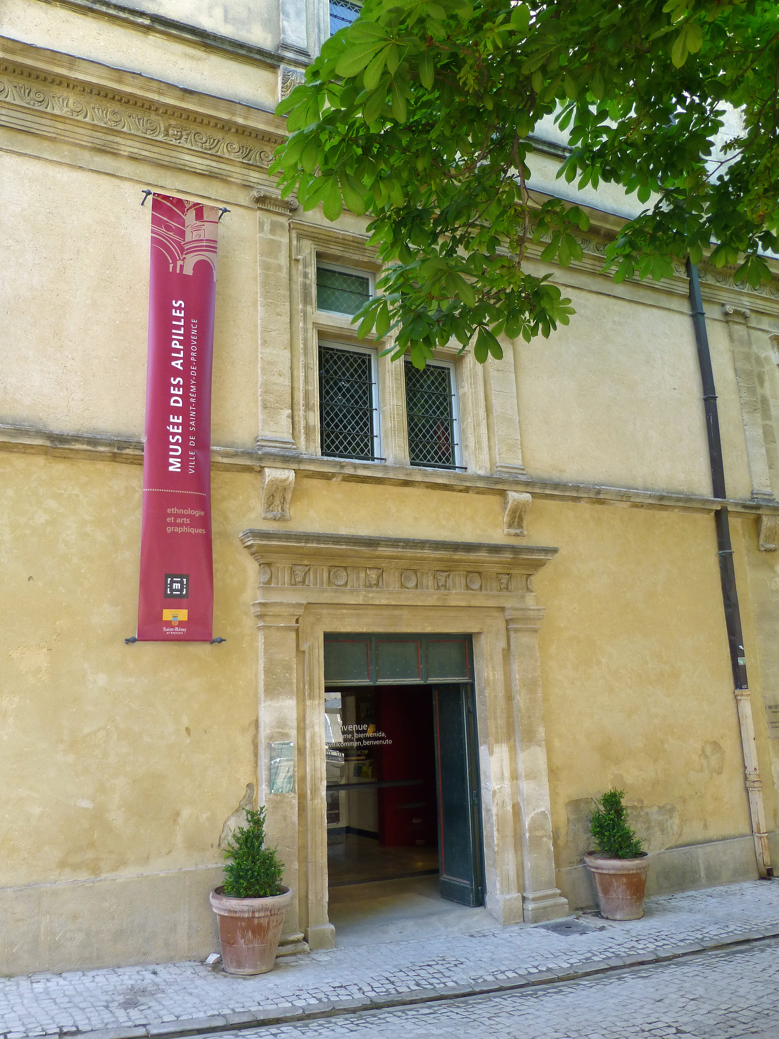 Saint-Rémy-de-Provence (Bouches-du-Rhône) : musée des Alpilles (Hôtel Mondragon)